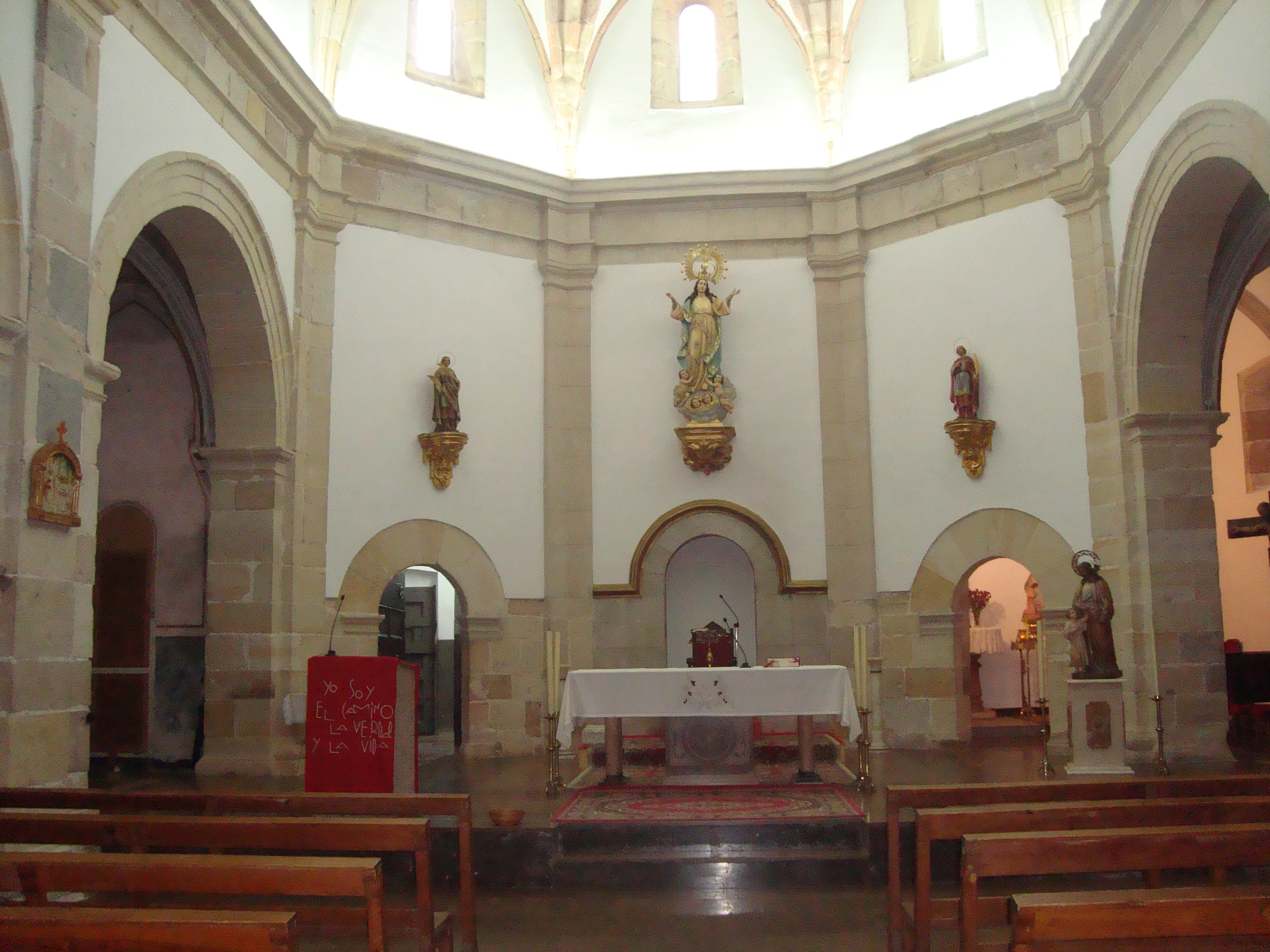 Església parroquial de l'Assumpció (Bell-lloc) 05.029-002.